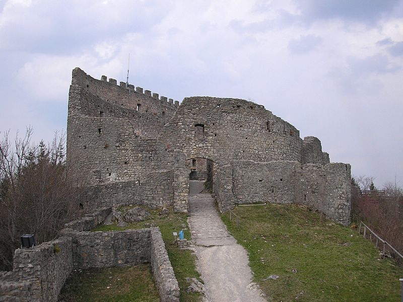 Burg Eisenberg bei Pfronten (Allgäu). Die Hauptburg von Süden.